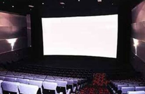 Tela do Cine Teixeira Mall, de Teixeira de Freitas, BA